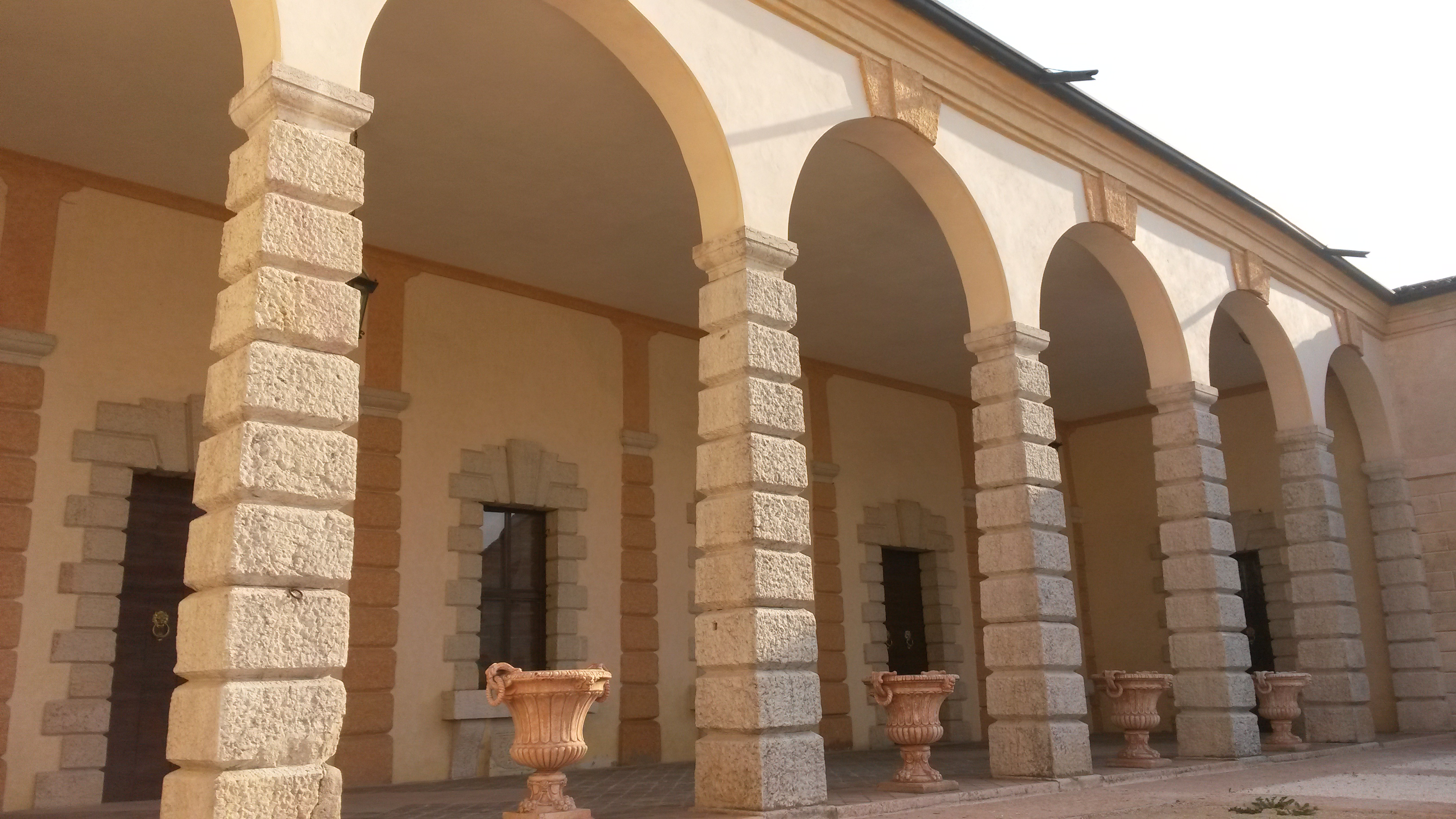 Loggia affacciata sulla corte interna, 1580 circa. L'impiego del bugnato rustico rimanda alla scuola di Michele Sanmicheli, cui appartiene anche Paolo Farinati, attivo in villa come pittore e, probabilmente, anche come architetto.